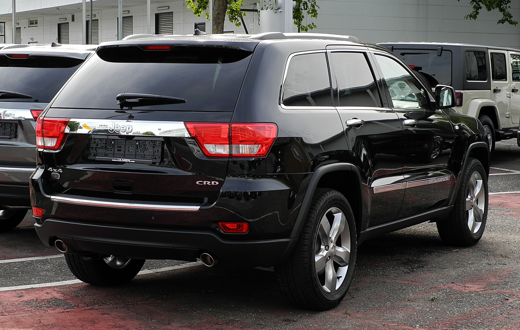 Jeep Grand Cherokee 3.0 CRD Overland (WK)